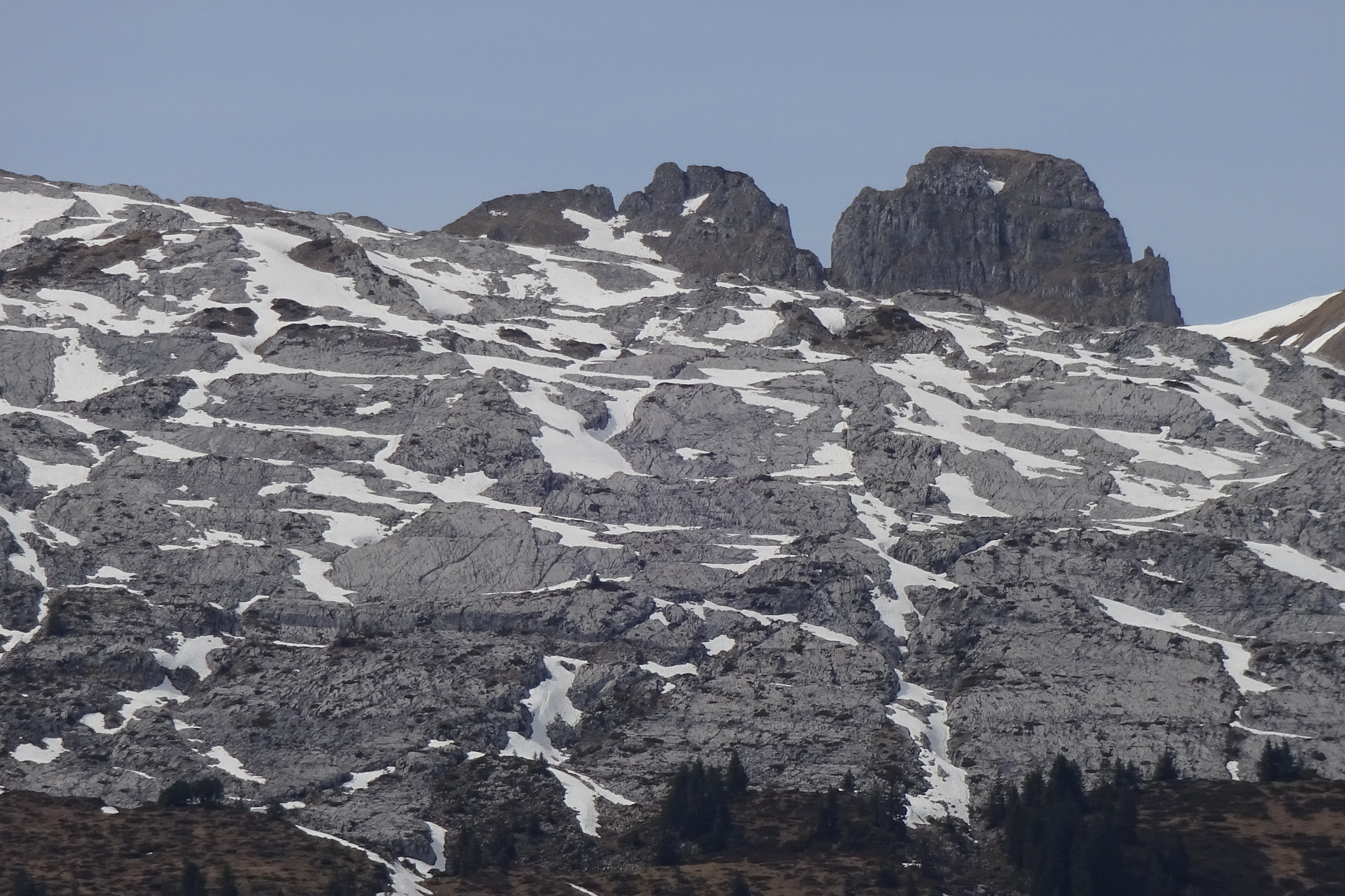 UNESCO Biosphäre Entlebuch (Nr. 1010P) – Schrattenfluh-Südostabdachung: Hengst, Karrenfeld _ Aufnahmestandort: Flühli-Sörenberg, Salwiden, Husegg – 46°48'50.60" N / 8°00'26.31" O